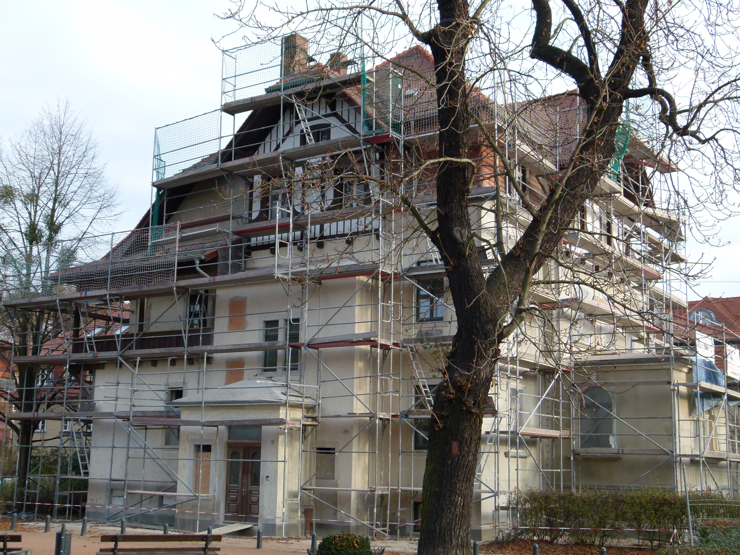 Denkmalgeschütztes Haus, ehem. Villa Stange, Bautzner Landstraße 17, Weißer Hirsch, Dresden